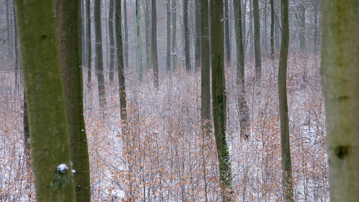 Naturverjüngung von Buchen in Mecklenburg